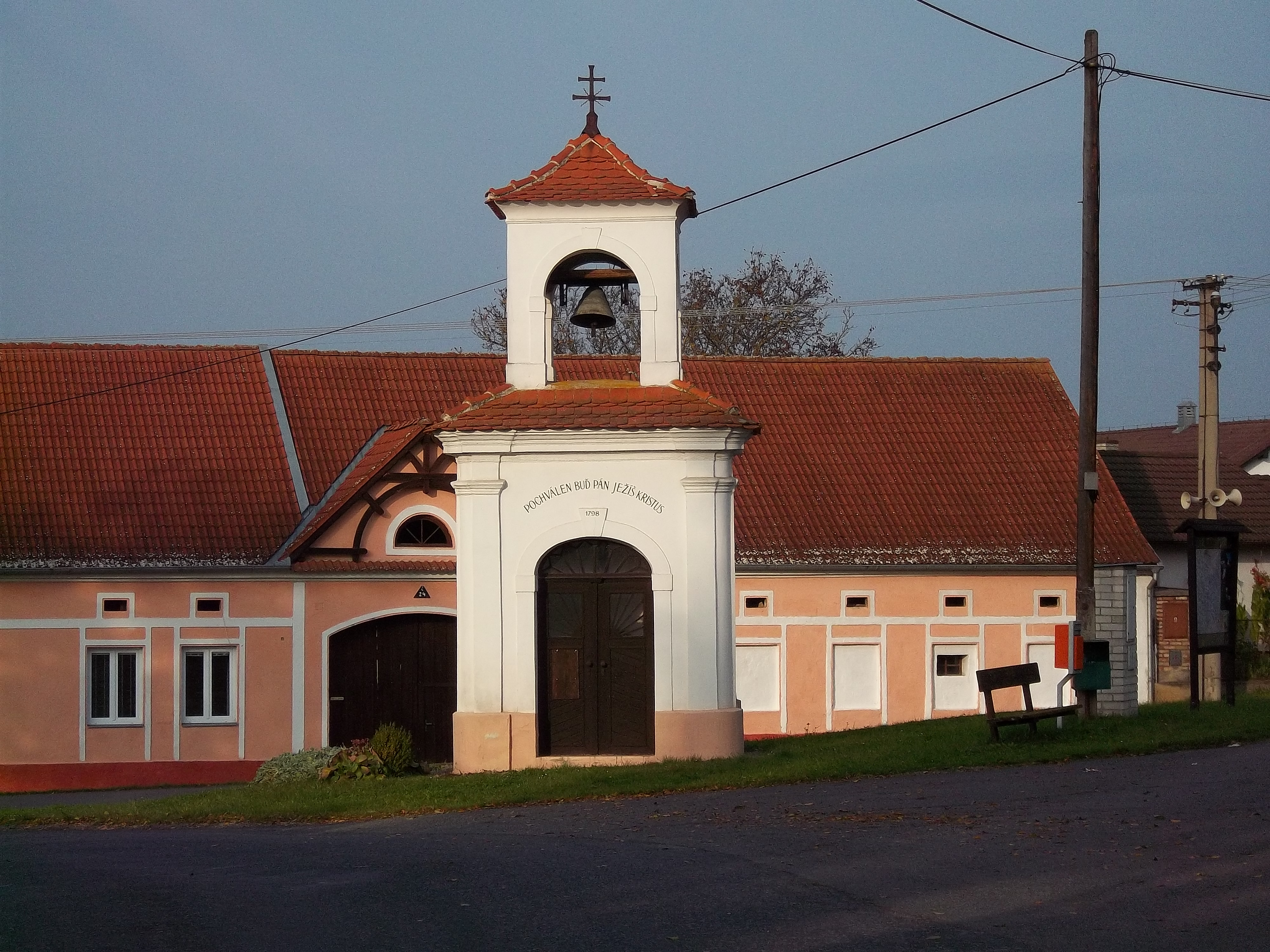 Hvožďanská kaplička, která je umístěna na návsi.